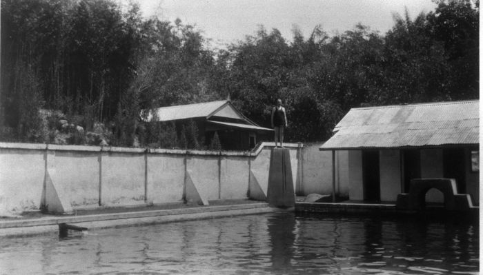 Foto. Het zwembad van Kali Taman te Salatiga, Midden Java